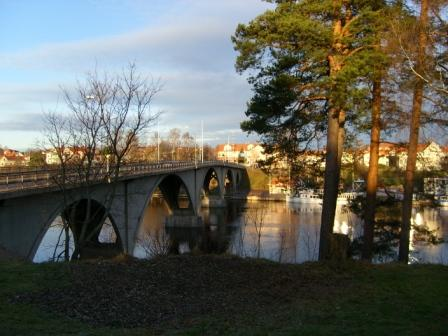 Leksandsbron 2006